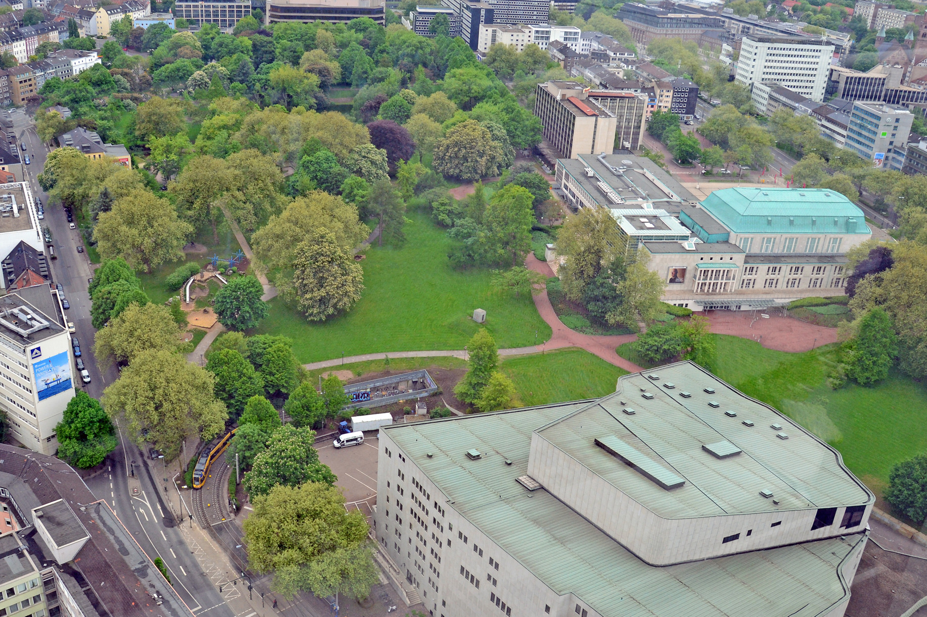 Stadtgarten Essen vom benachbarten RWE-Turm gesehen